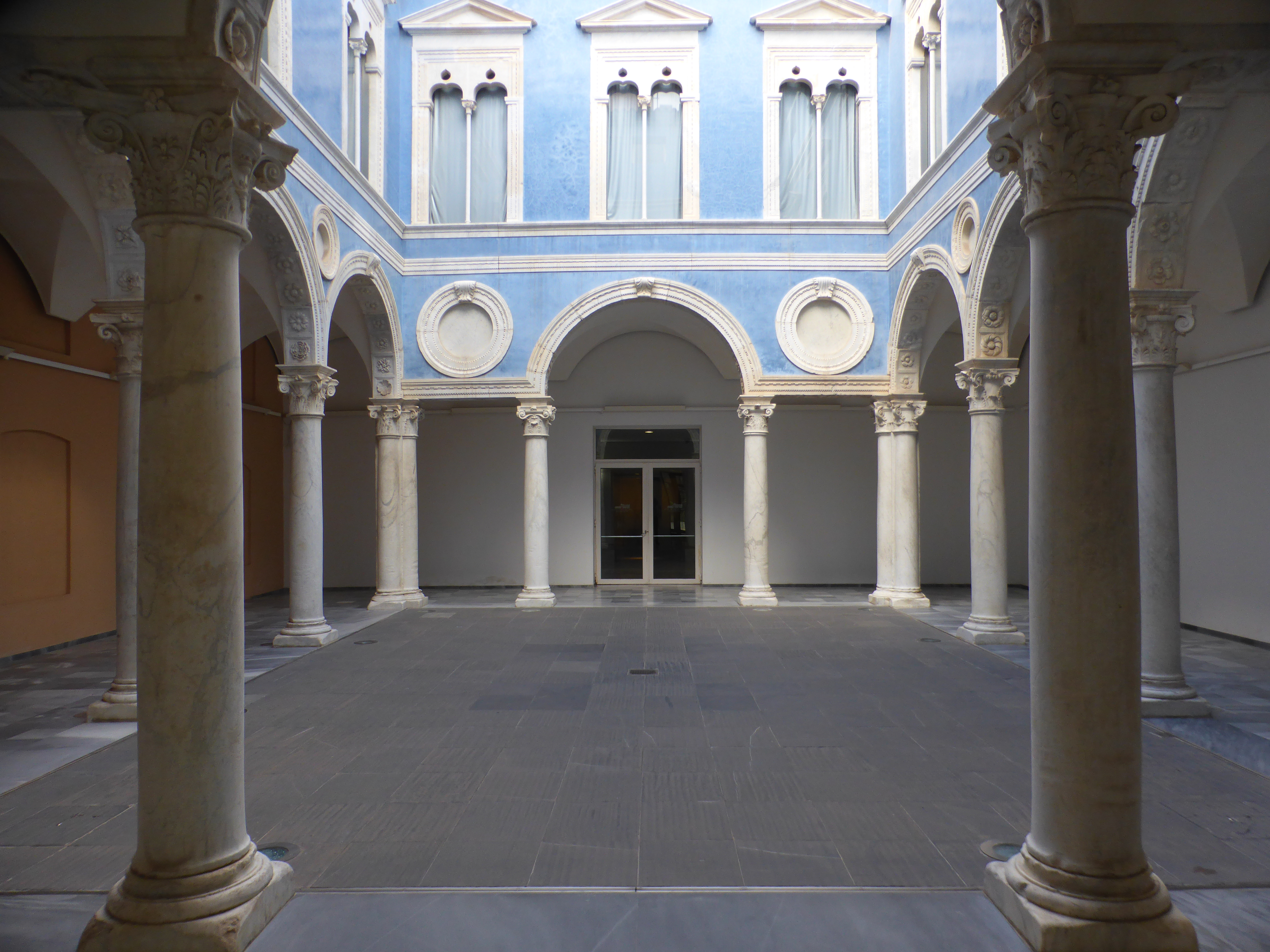 Dentro del recinto del Museo de Bellas Artes de Valencia, se ha montado este antiguo patio renacentista. El palacio del Embajador Vich está considerado uno de los primeros ejemplos del estilo Renacimiento en España, siendo construido hacia el año 1525.